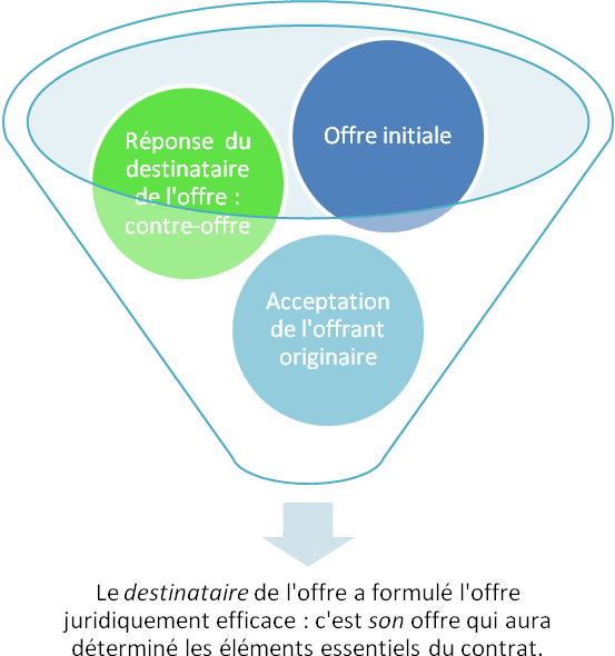 Schéma expliquant le fonctionnement d'une contre-offre, et comment le destinataire de l'offre peut finalement être l'auteur de l'offre juridiquement efficace. En forme d'entonnoir parce que, en principe, la contre-offre est plus précise, plus ferme que l'offre originale.